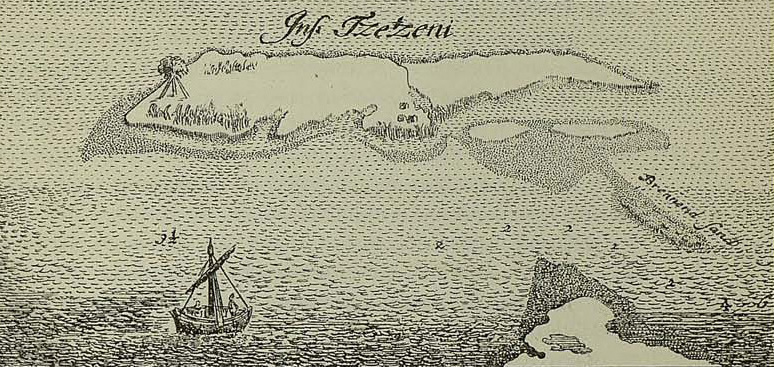 Остров Чечень иллюстрация к книге Олеарий А. Описание путешествия в Московию и через Московию в Персию и обратно. — СПб. Изд.